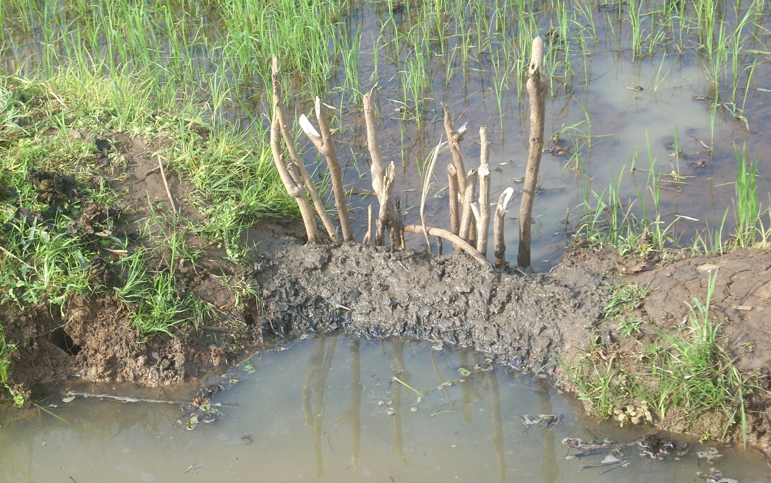 വയല്‍കാഴ്ചകള്‍. അടാട്ട്, ഒമ്പതുമുറി പാടം, തൃശ്ശൂര്‍ This media file is uploaded with Malayalam loves Wikimedia event - 2.